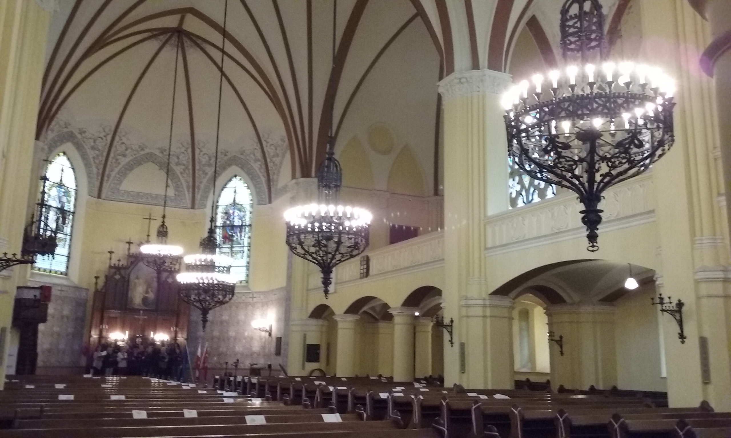 Wnętrze kościoła ewangelicko-augsburskiego Zbawiciela z 1897 roku, w sześćdziesięciotysięcznym Tomaszowie Mazowieckim w województwie łódzkim, PL, EU.